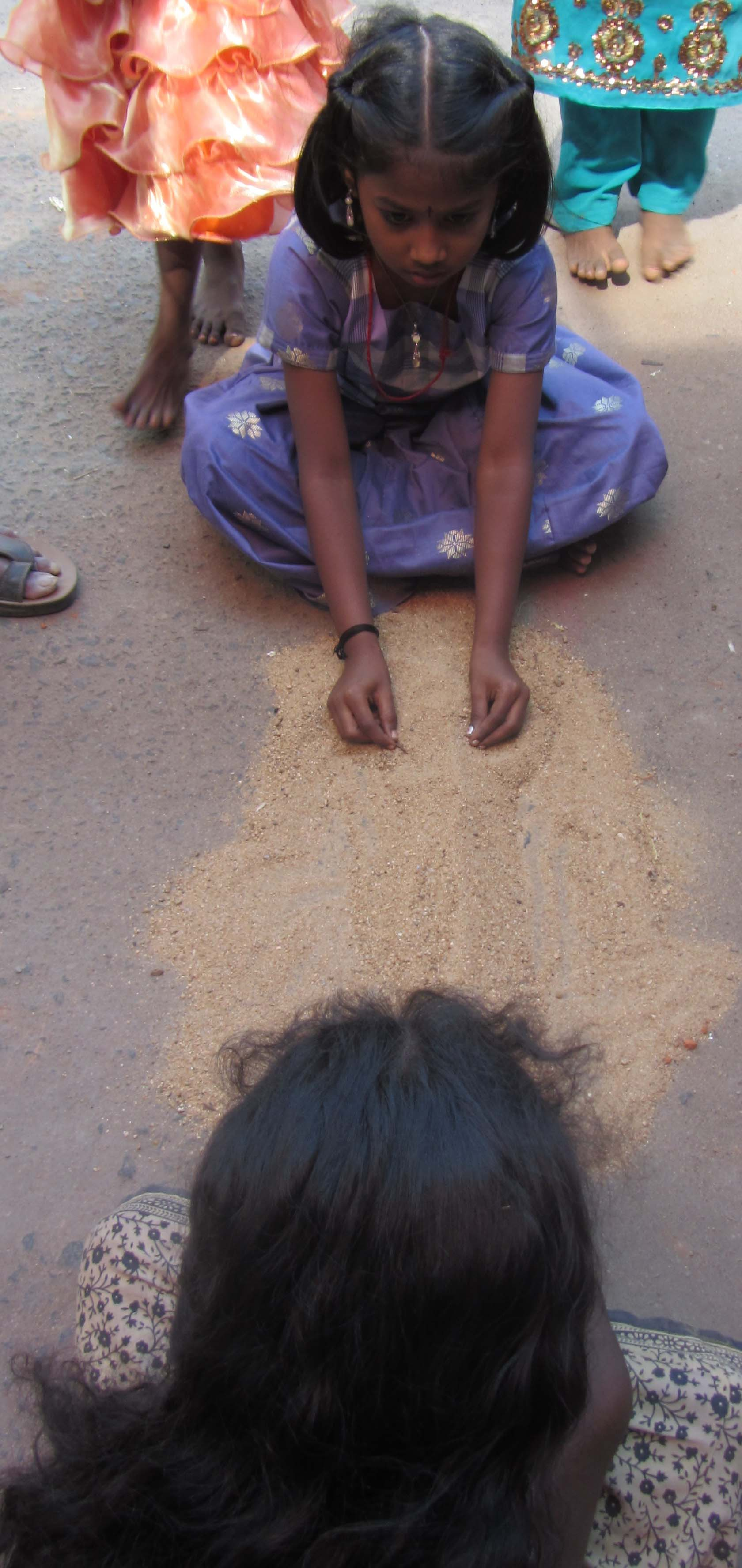 சங்ககாலக் 'காய்மறை விளையாட்டு'. அண்மைய கால 'கிச்சுக் கிச்சுத் தம்பலம்' விளையாட்டு. முதல் படி